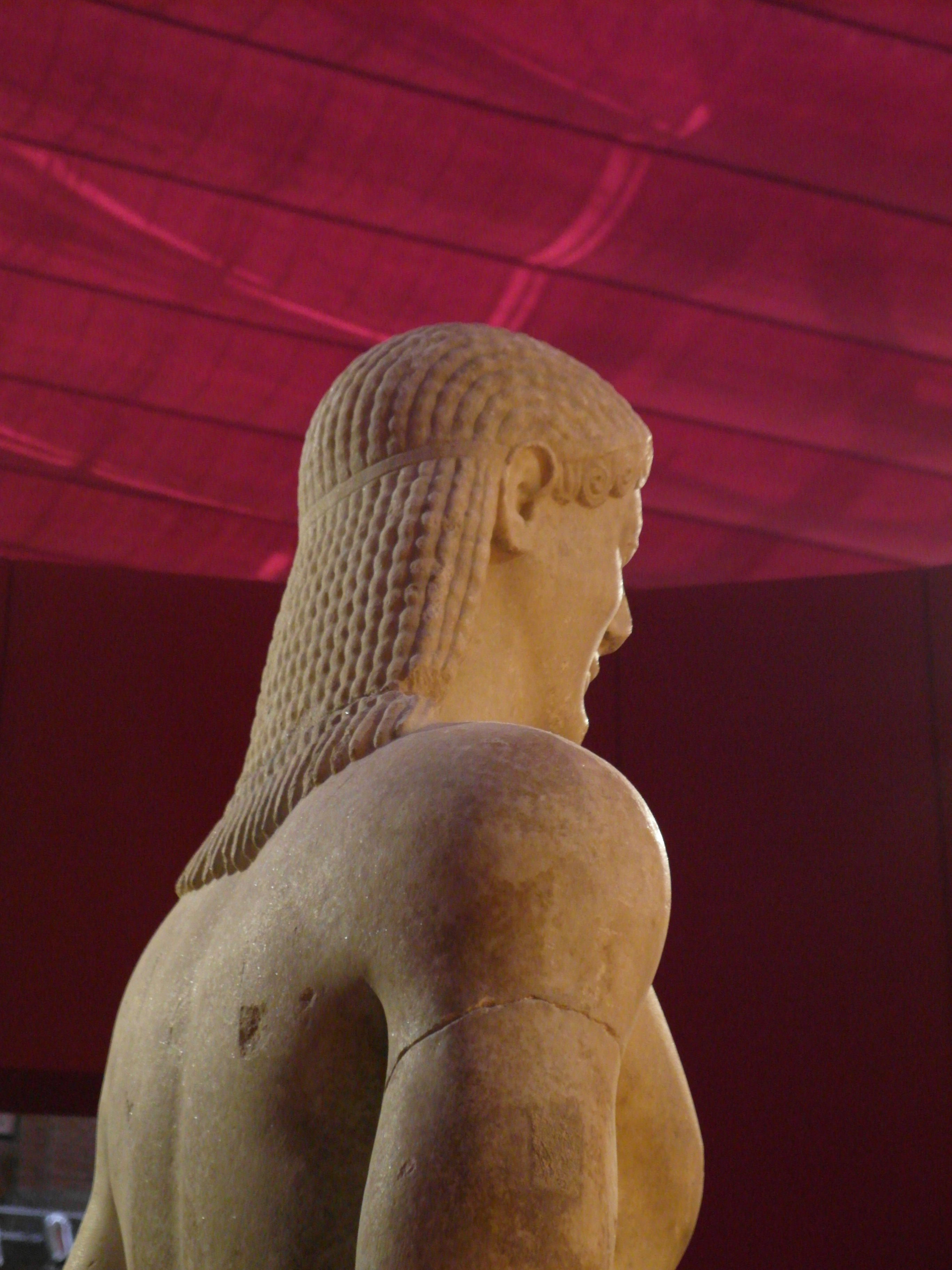 Kouros de mármol del templo de Apolo Ptoios en Beocia, 520 a. de C. Detalle del peinado.